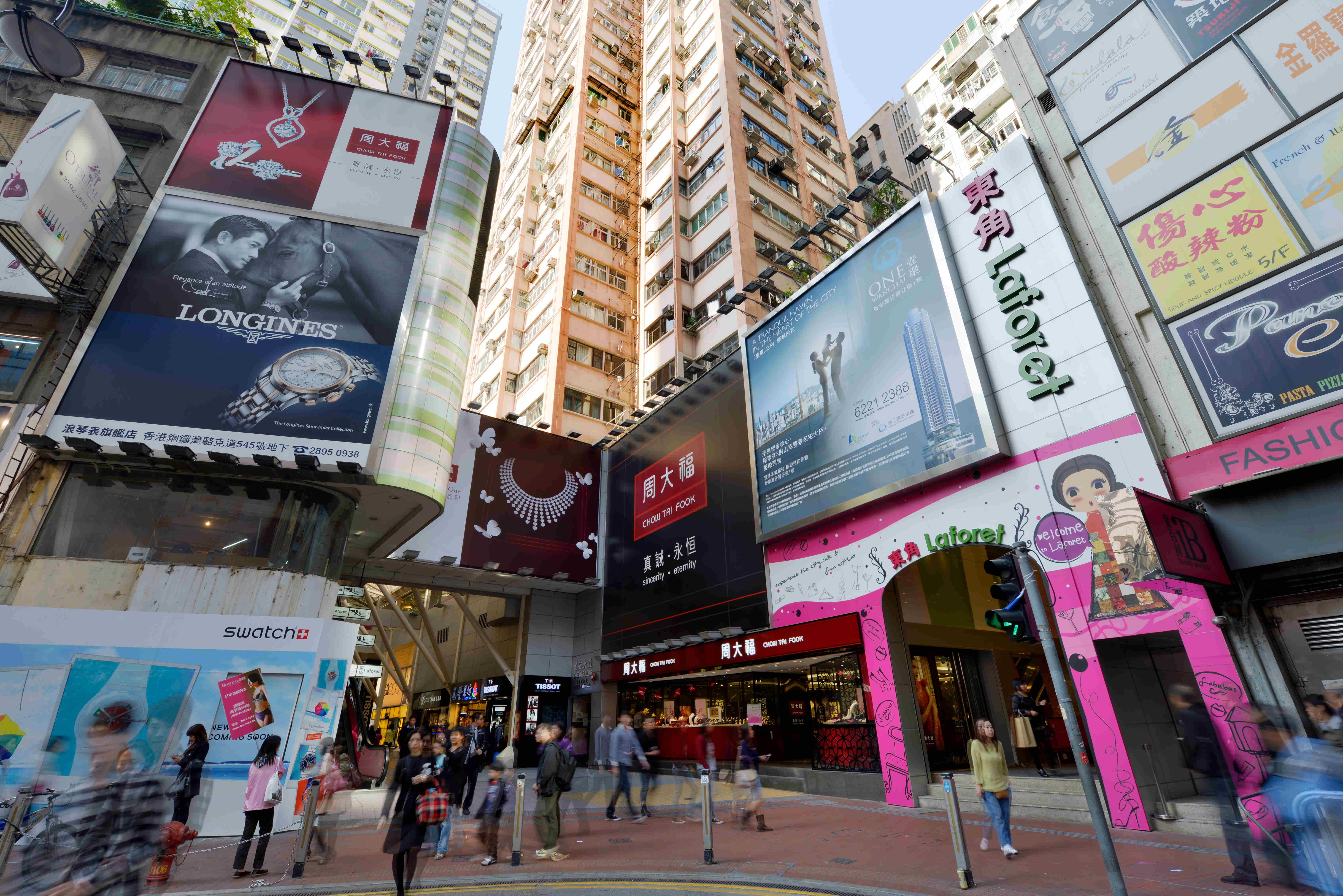 粵語: 東角Laforet